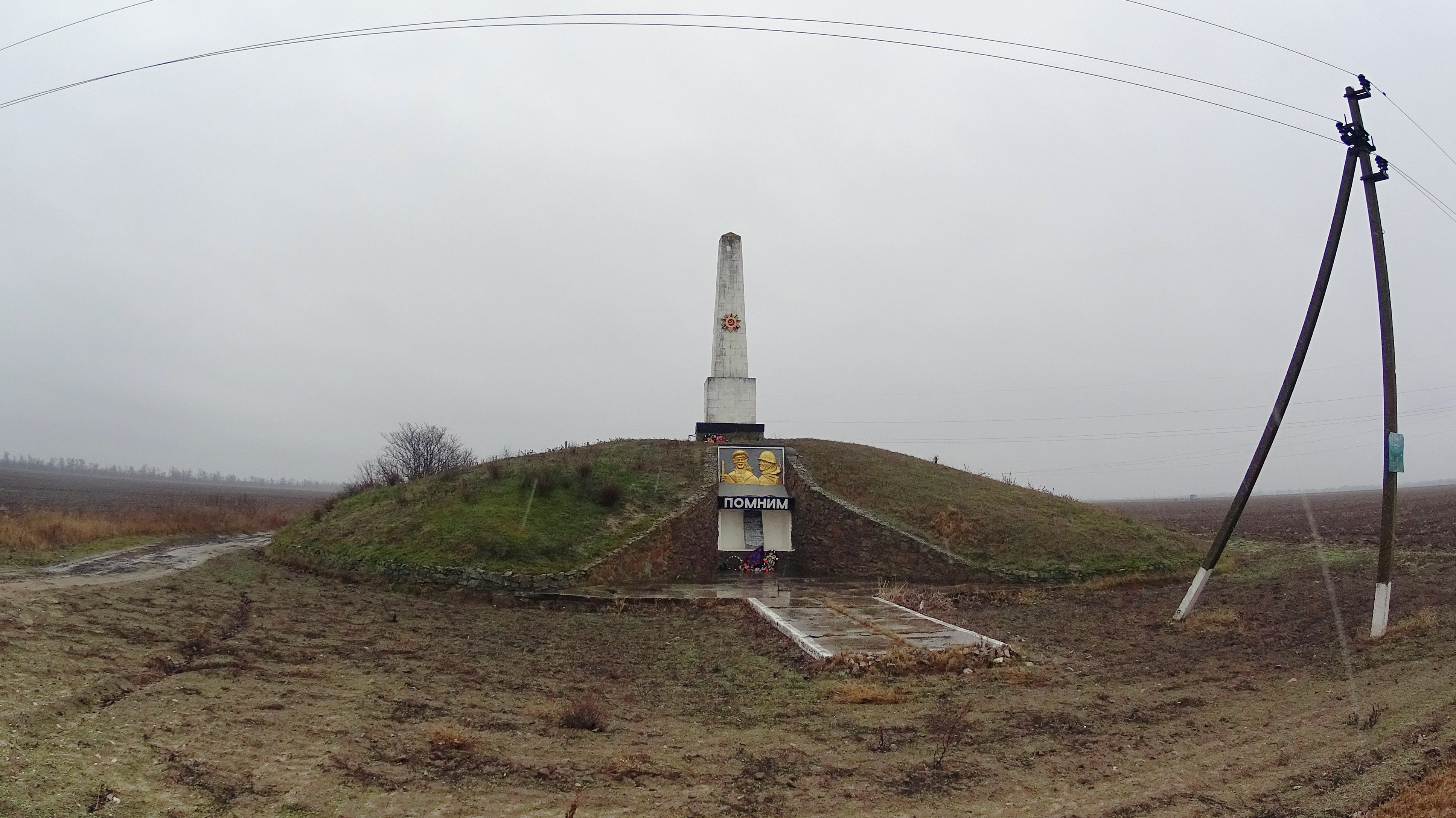 Пам’ятник на честь захисників Батьківщини, с. Чулаківка, 2,5 км на схід від села